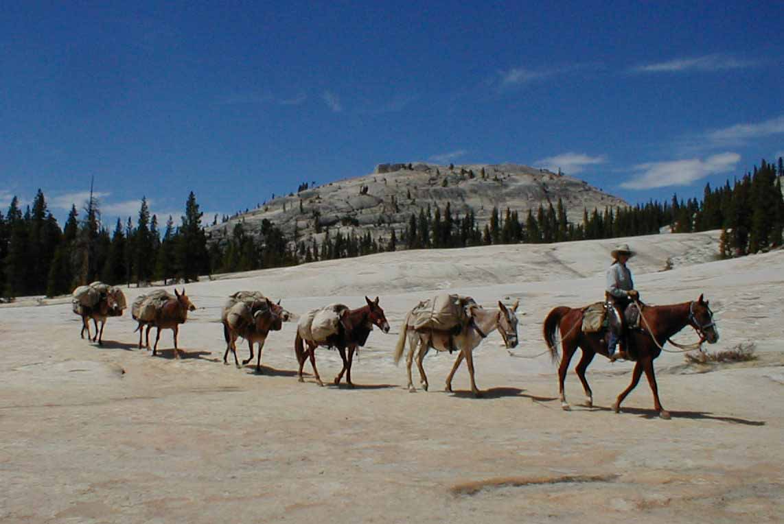 Караван мулів в парку Йосеміті